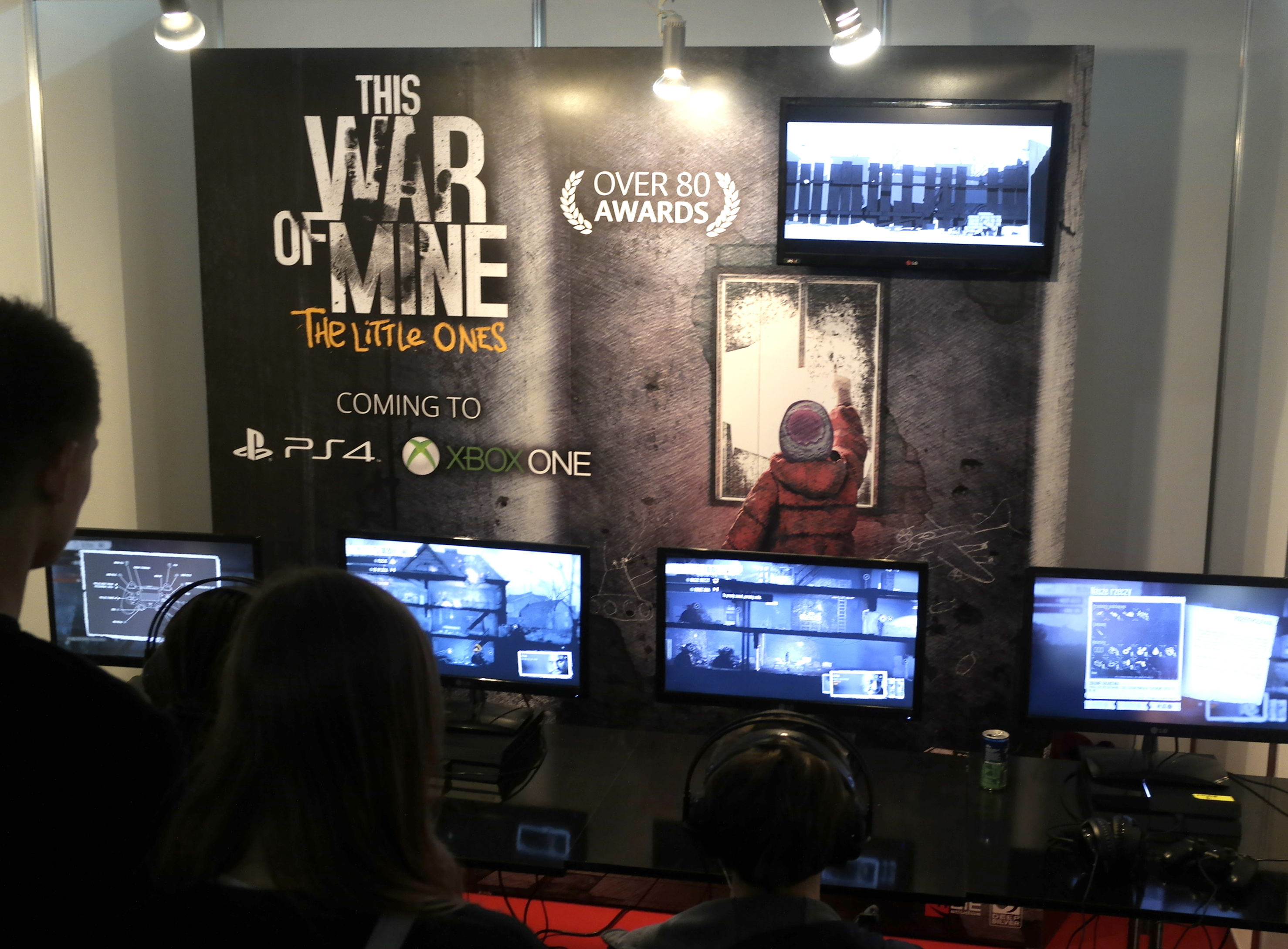 Ekspozycja na targach Poznań Game Arena 2015